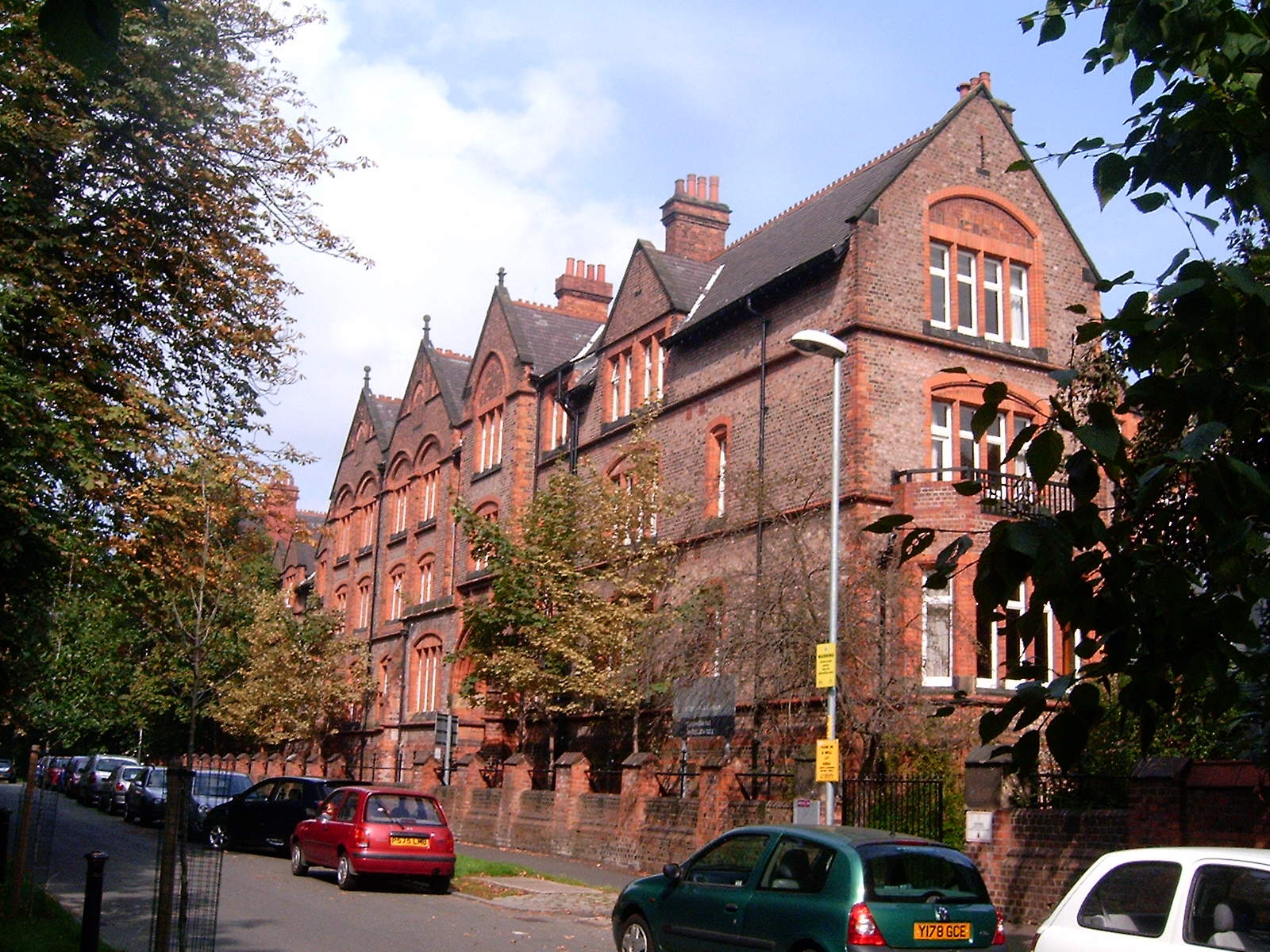 Dalton-Ellis Hall, Manchester